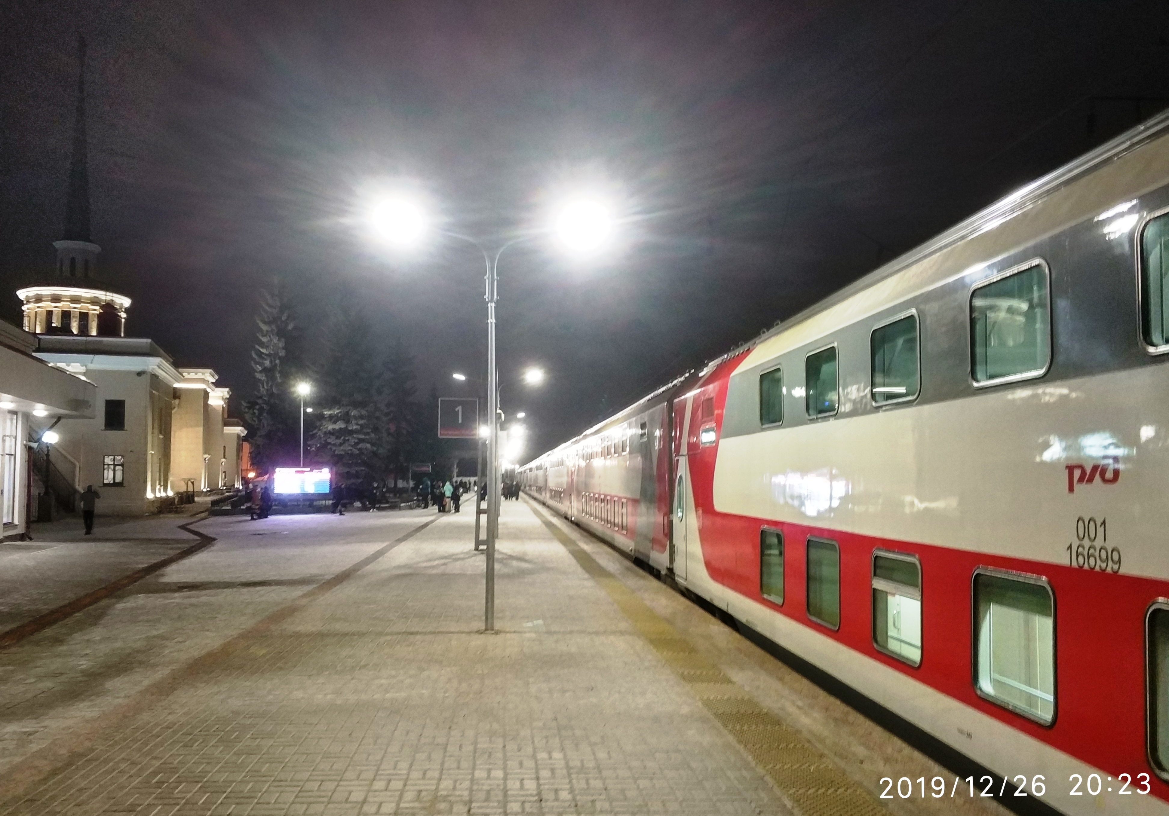 Скорый фирменный поезд "КАРЕЛИЯ"(№ 17А/18А) РЖД , обслуживающий маршрут Петрозаводск—Москва—Петрозаводск на перроне Ж/Д вокзала в Петрозаводске